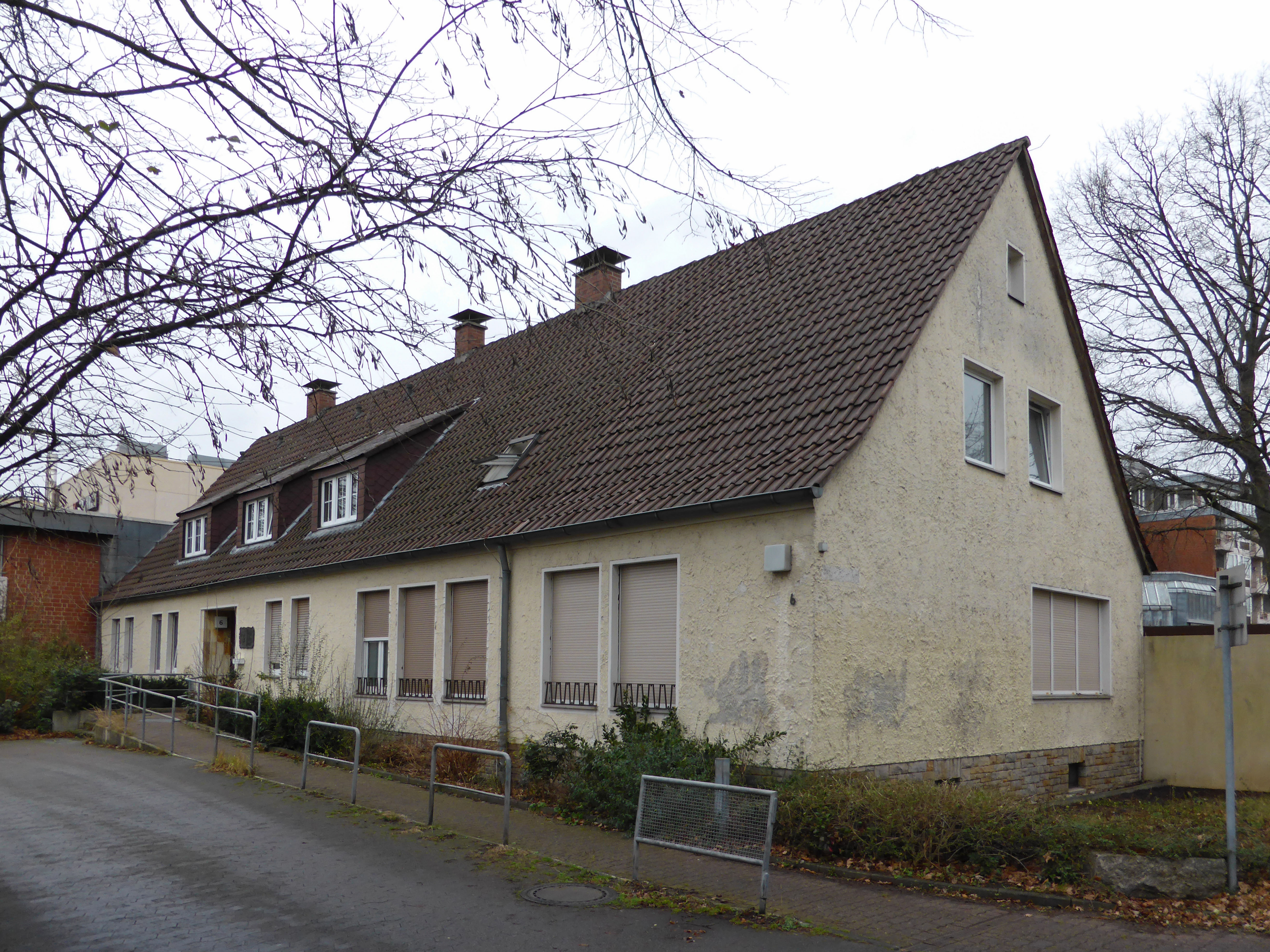 Prälat-Holling-Haus in Wolfsburg, Straßenseite.